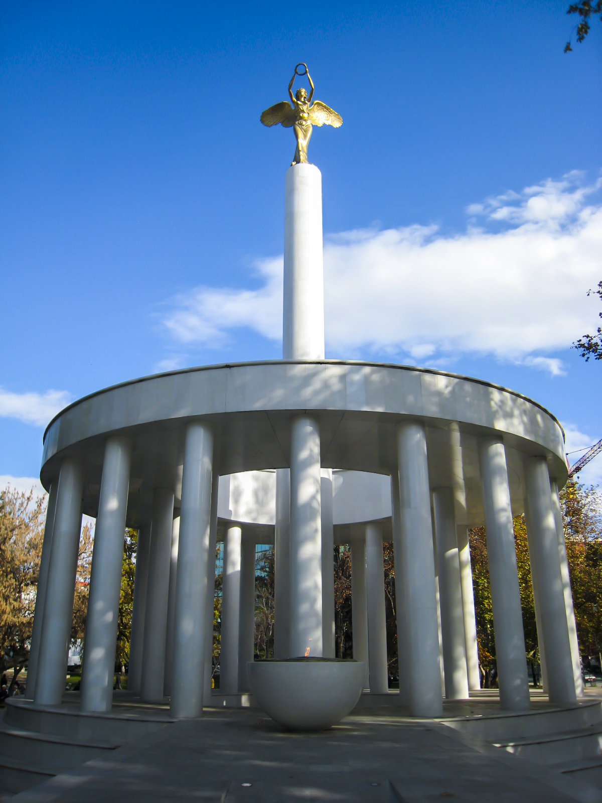 Споменикот на Нике